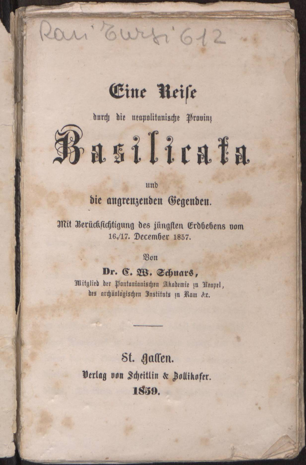 Frontespizio